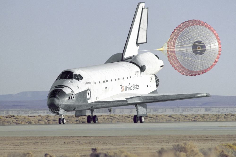 Space Shuttle Atlantis landet mit Bremsfallschirm